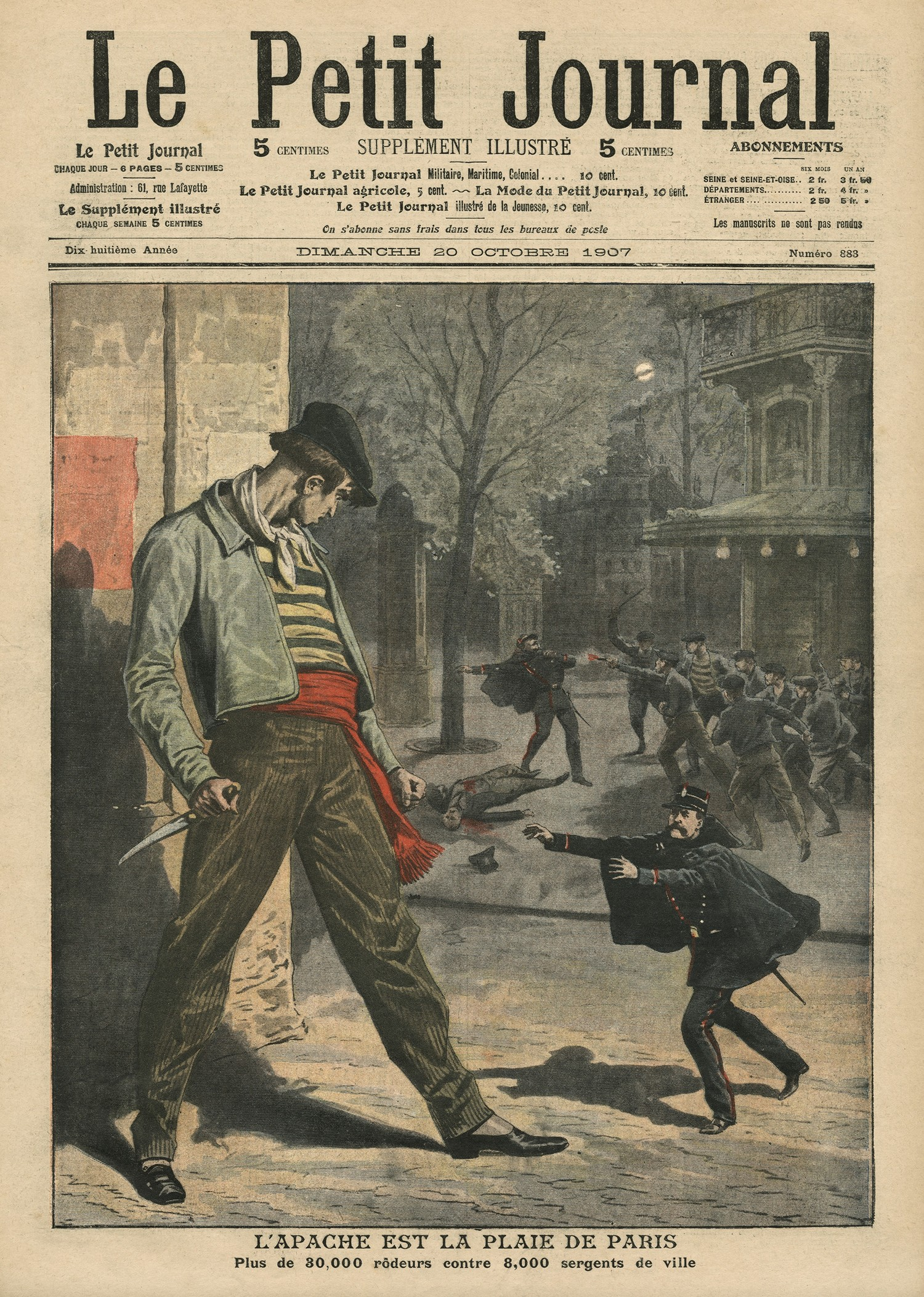 Cover page of "Le Petit Journal", 20 0ctober 1907. "L'apache est la plaie de Paris. Plus de 30.000 rôdeurs contre 8.000 sergents de ville."